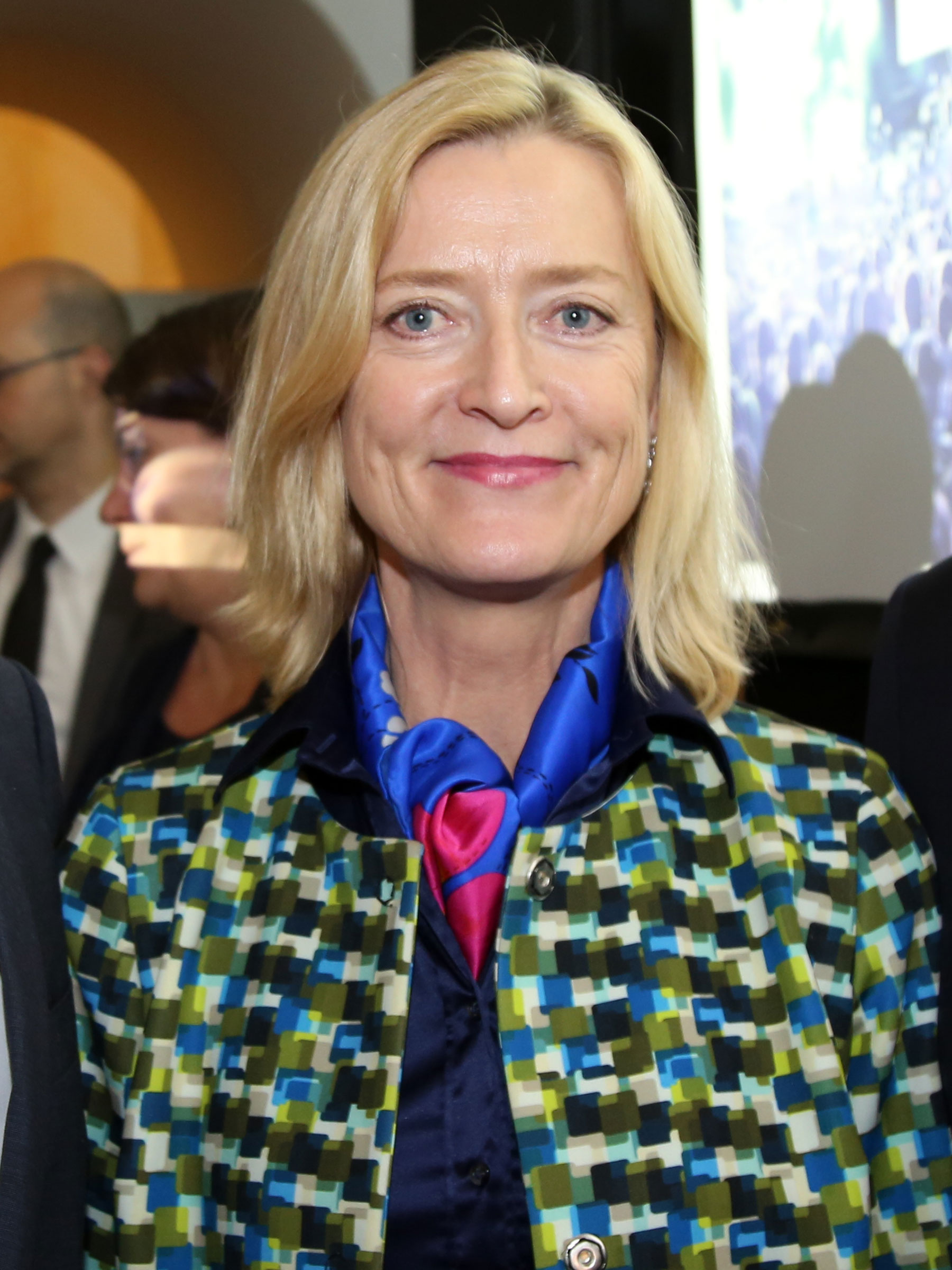 Rachinger_Johanna-3697